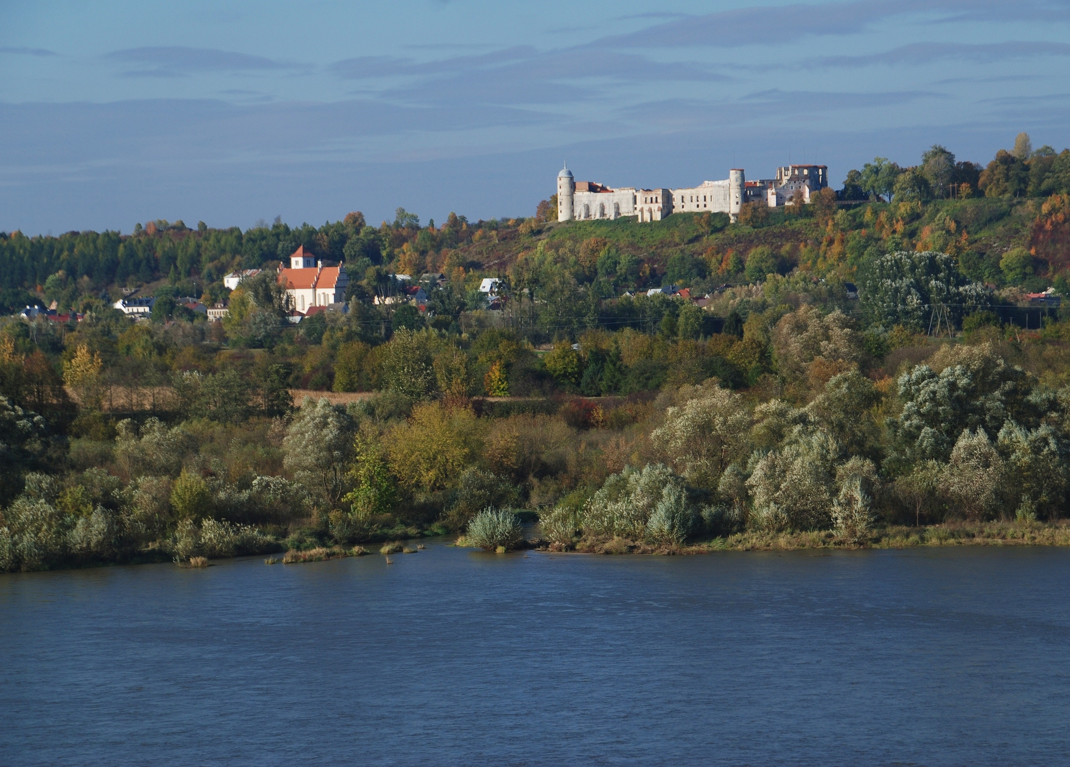 Janowiec, Zamek Wikidata has entry Q9386646 with data related to this item.